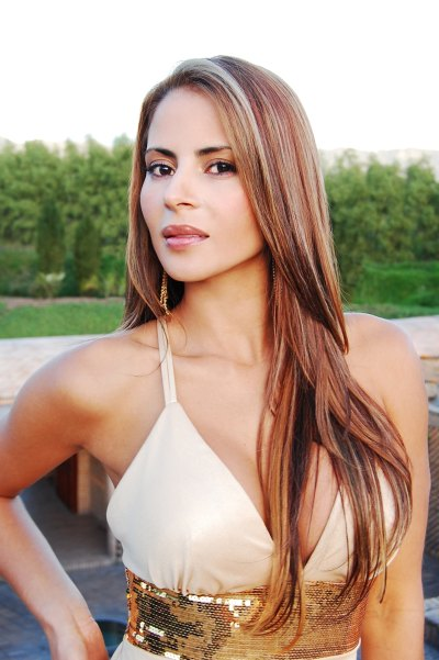 Imagen de Stefania Gomez